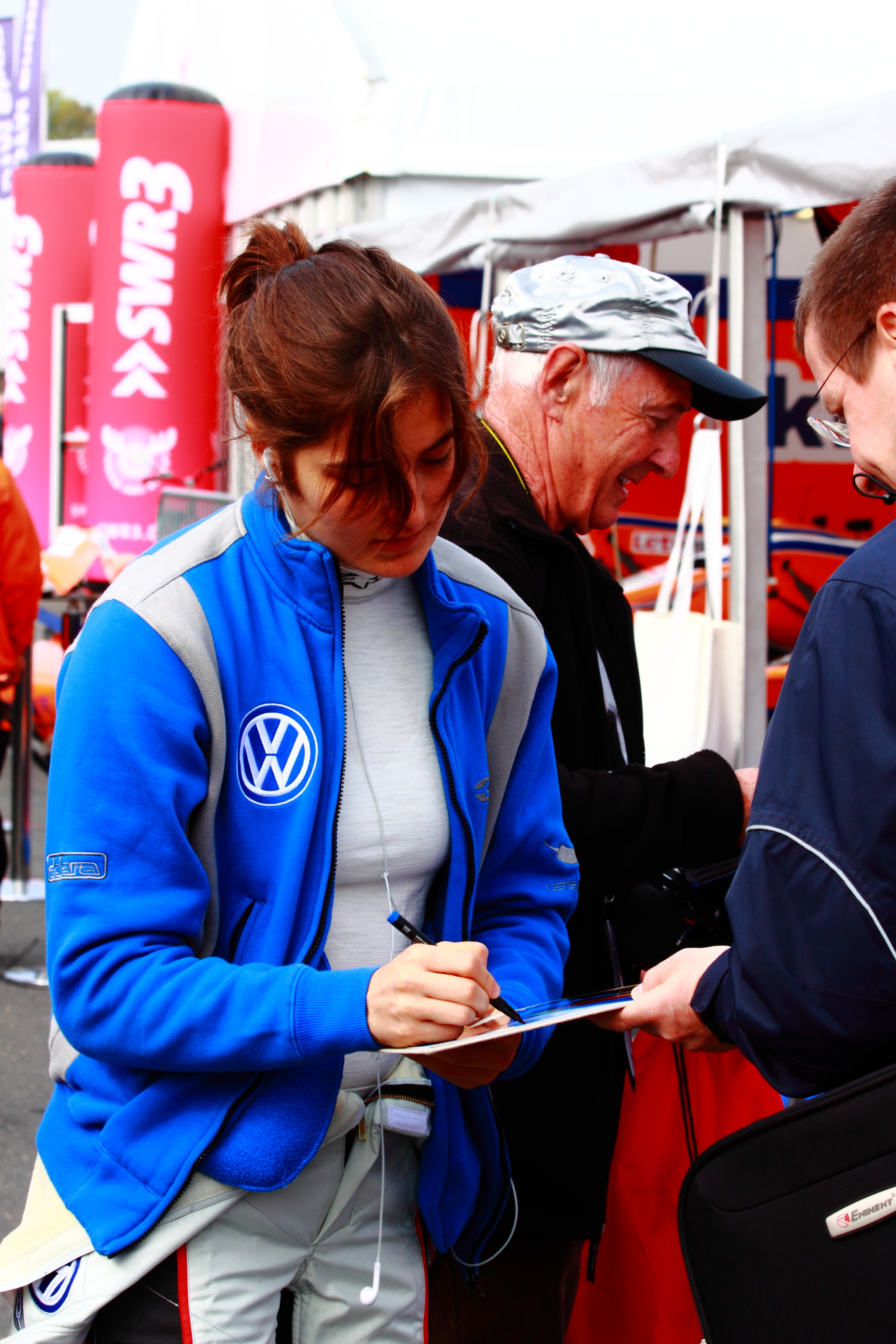 Tatiana Calderón ist 2015 die einzige Dame im Starterfeld der FIA F3 Euroseries.